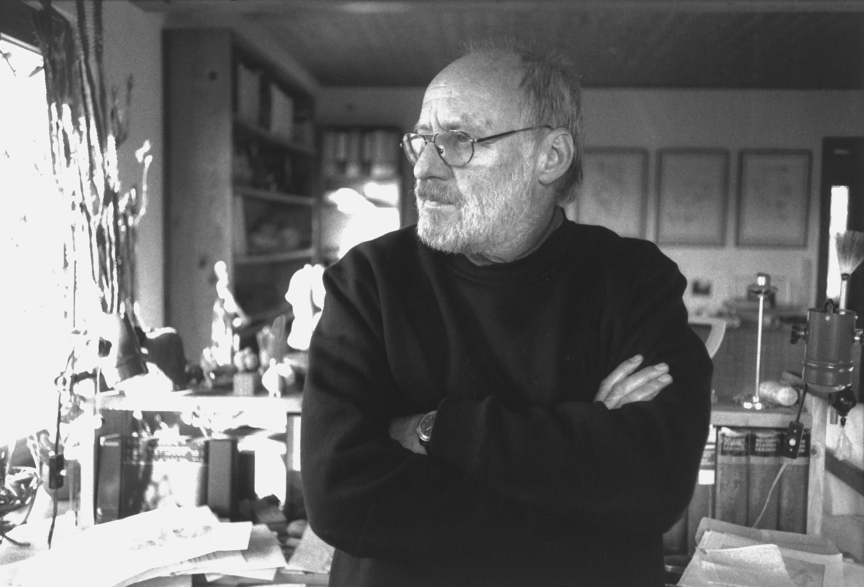 Harald Stieding in seinem Atelier